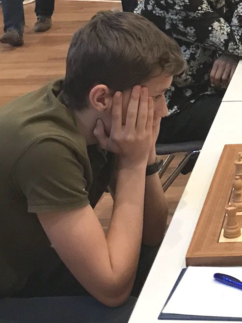 Andrey Esipenko, Runde 9 der Grenke Chess Open 2019 in Karlsruhe.